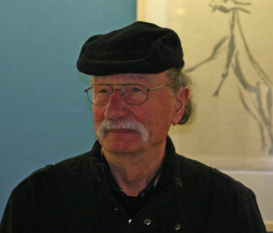 Der Maler Friedrich-Wilhelm Fretwurst während eines Ausstellungsbesuchs in Berlin.